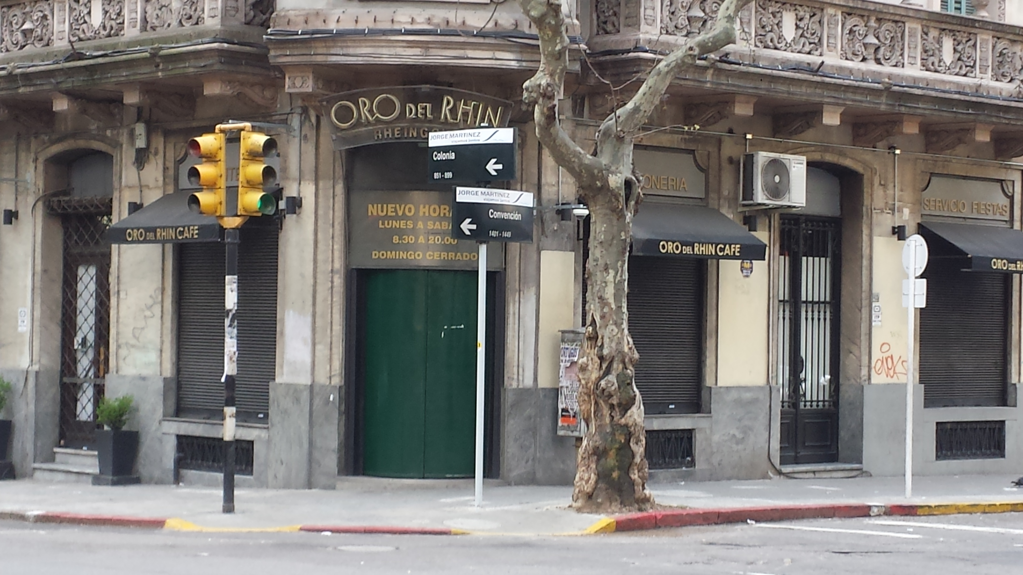 tradicional confitería en Montevideo, Uruguay